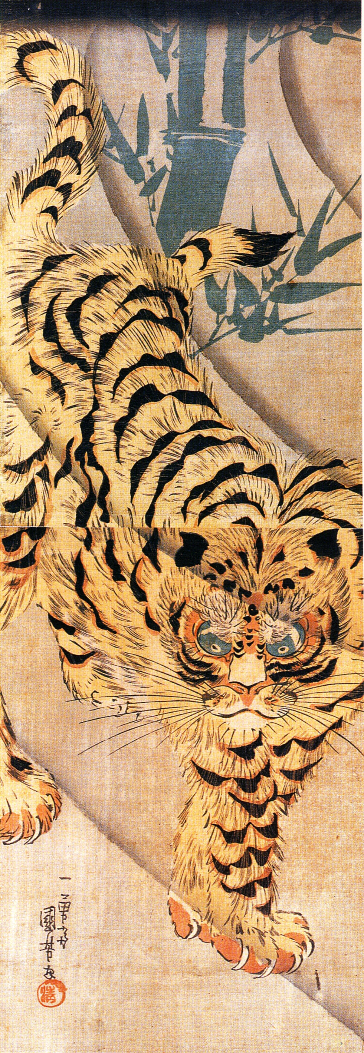 「竹に虎」